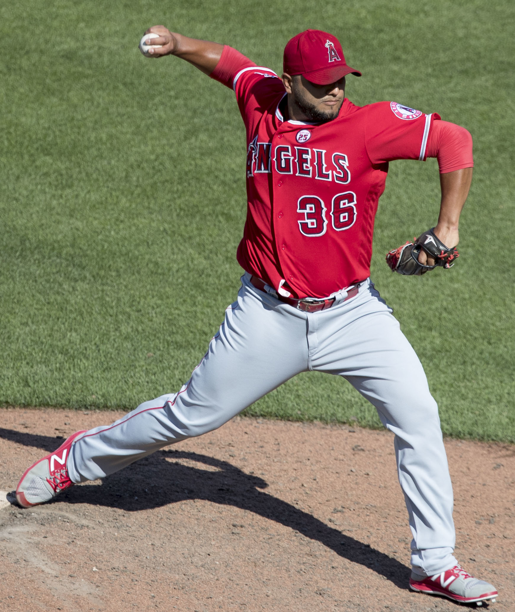 Angels at Orioles 8/20/17